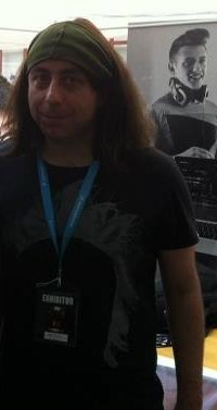 Opera propria